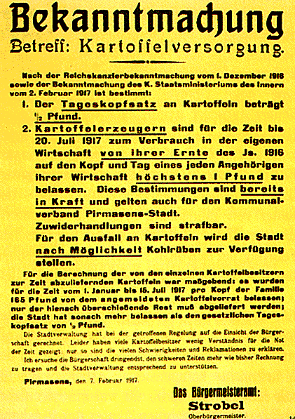 Bekanntmachung der Kartoffelrationierung, Stadt Pirmasens, Germany, 1917